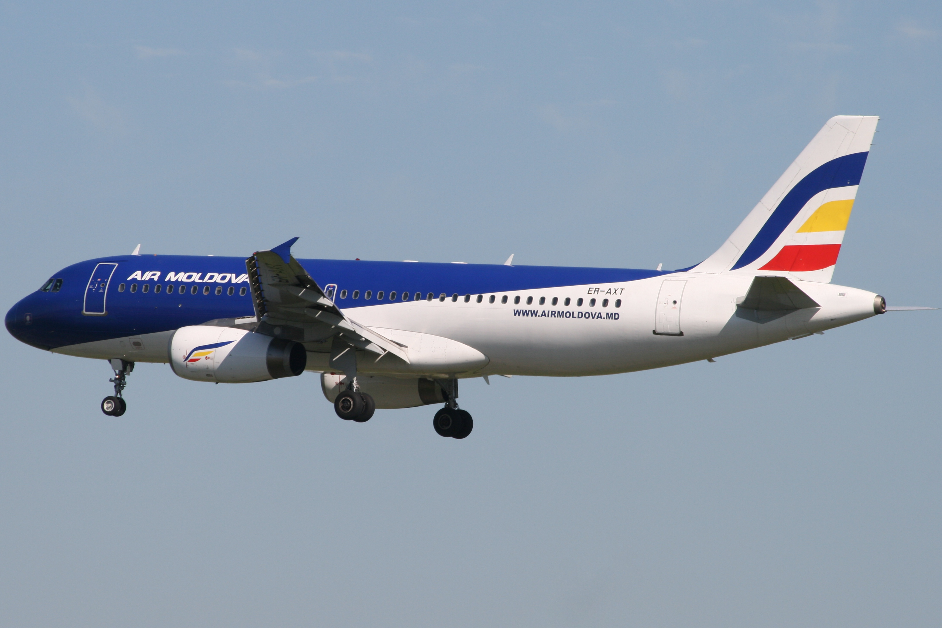 ER-AXT, Air Moldova Airbus 320-200 (A320-231), c/n 0249